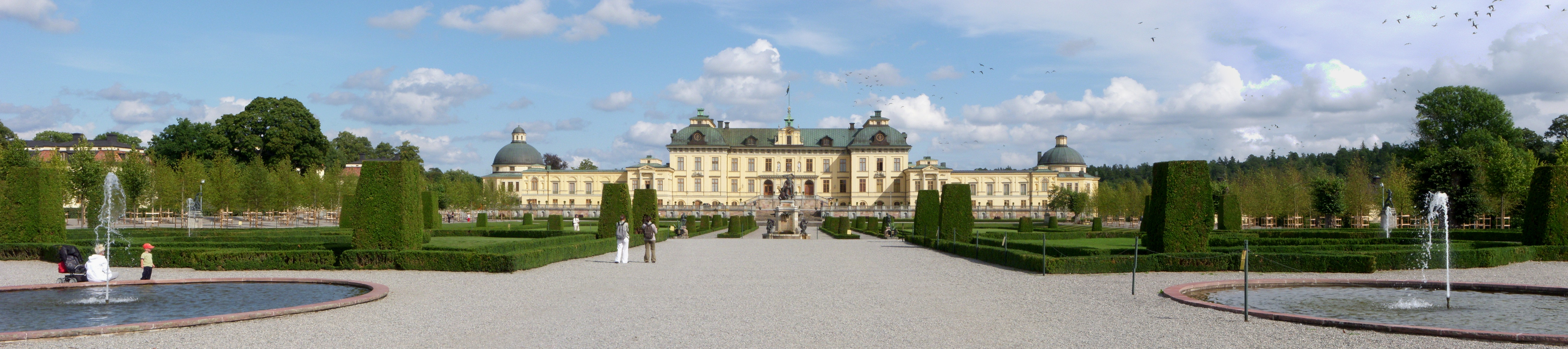 Drottnigholms slott, panorama från barockträdgården